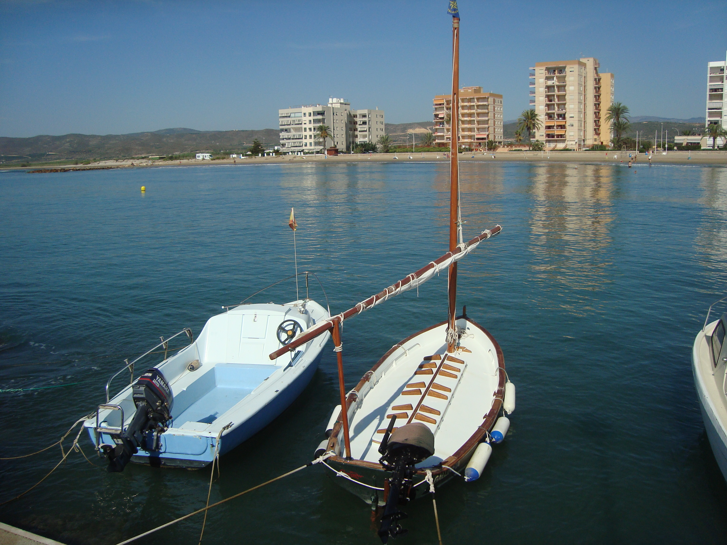 Platja Sud, Torrenostra